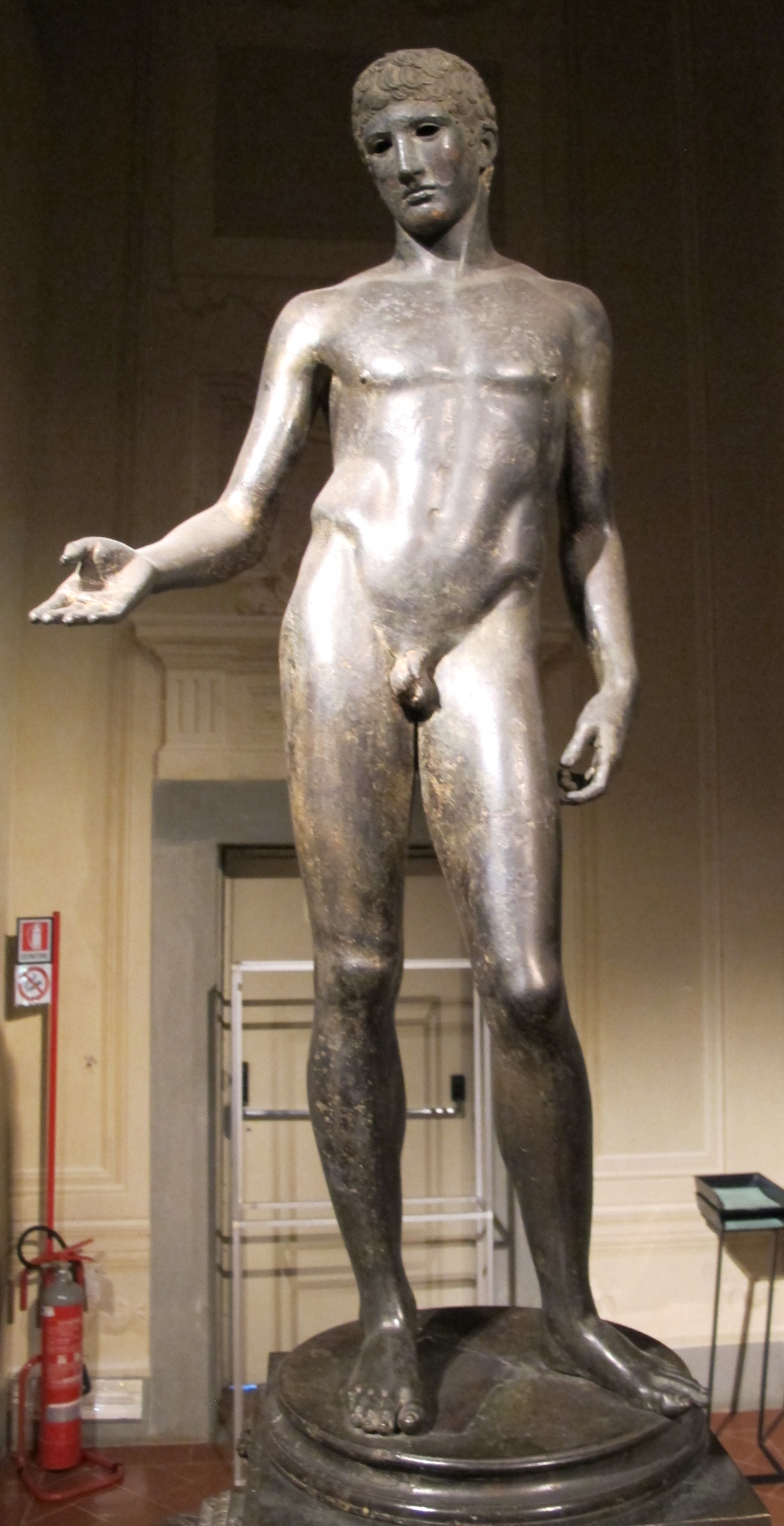 "Idolino di Pesaro" — in the Uffizi, Florence.